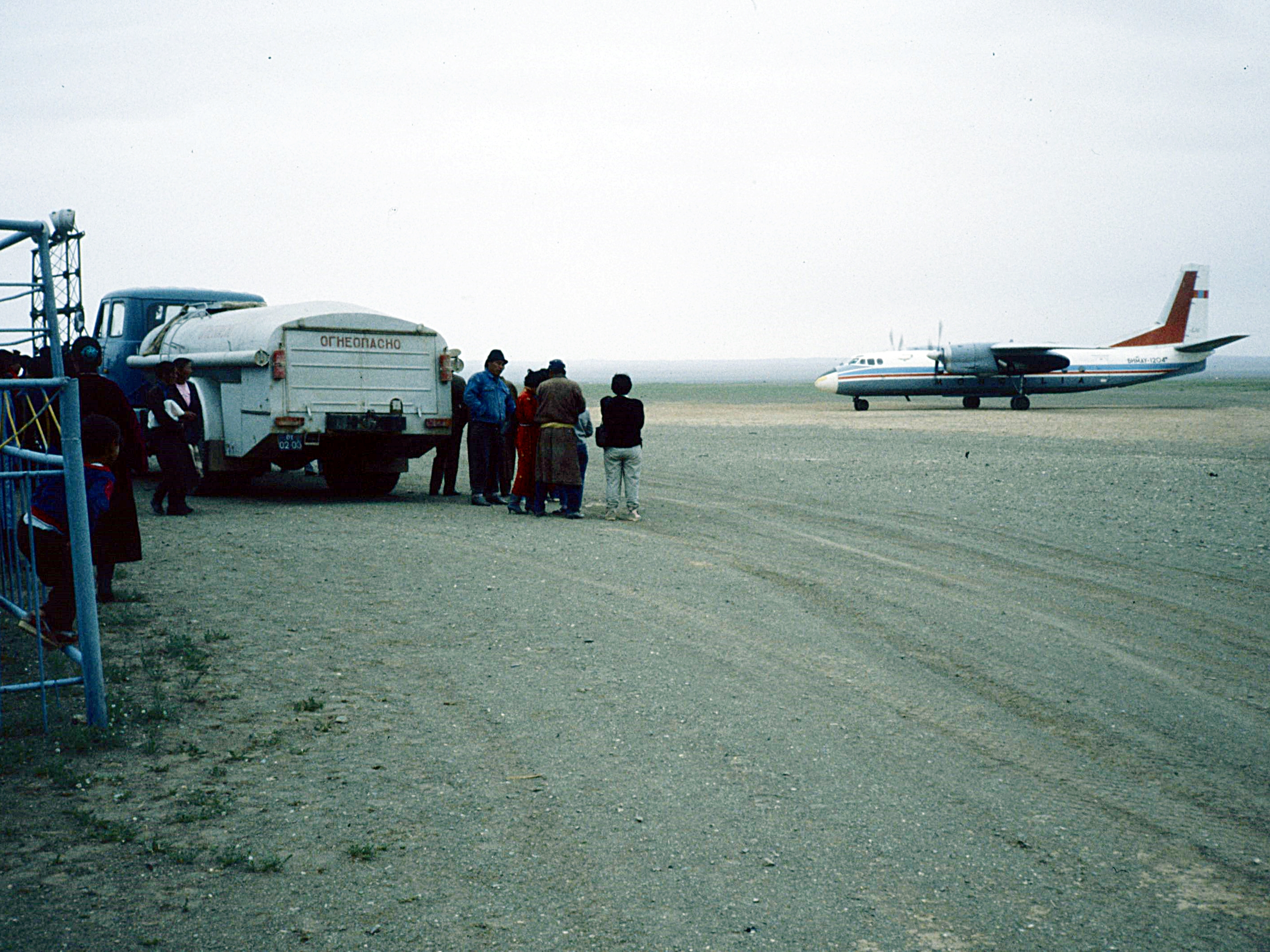 Alter Flugplatz in Dalandsgad mit gerade gelandeter Antonov 24